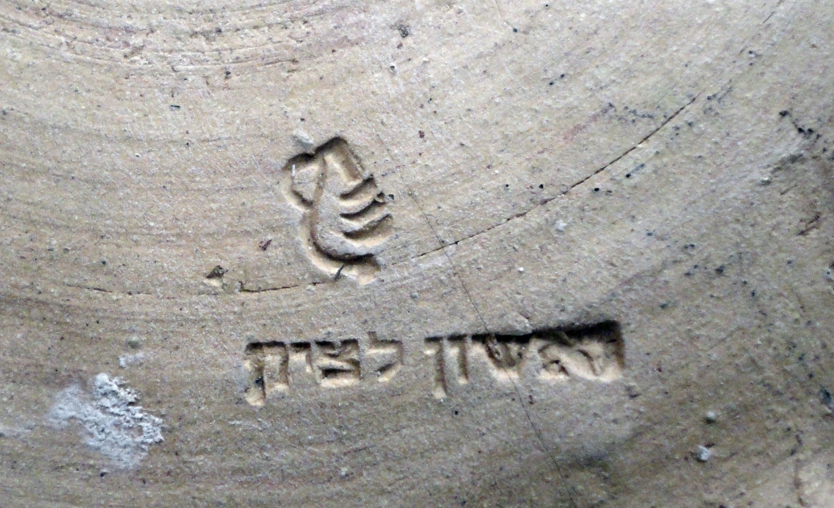 לוגו של "כד וספל" מוטבע בתחתית כלי.